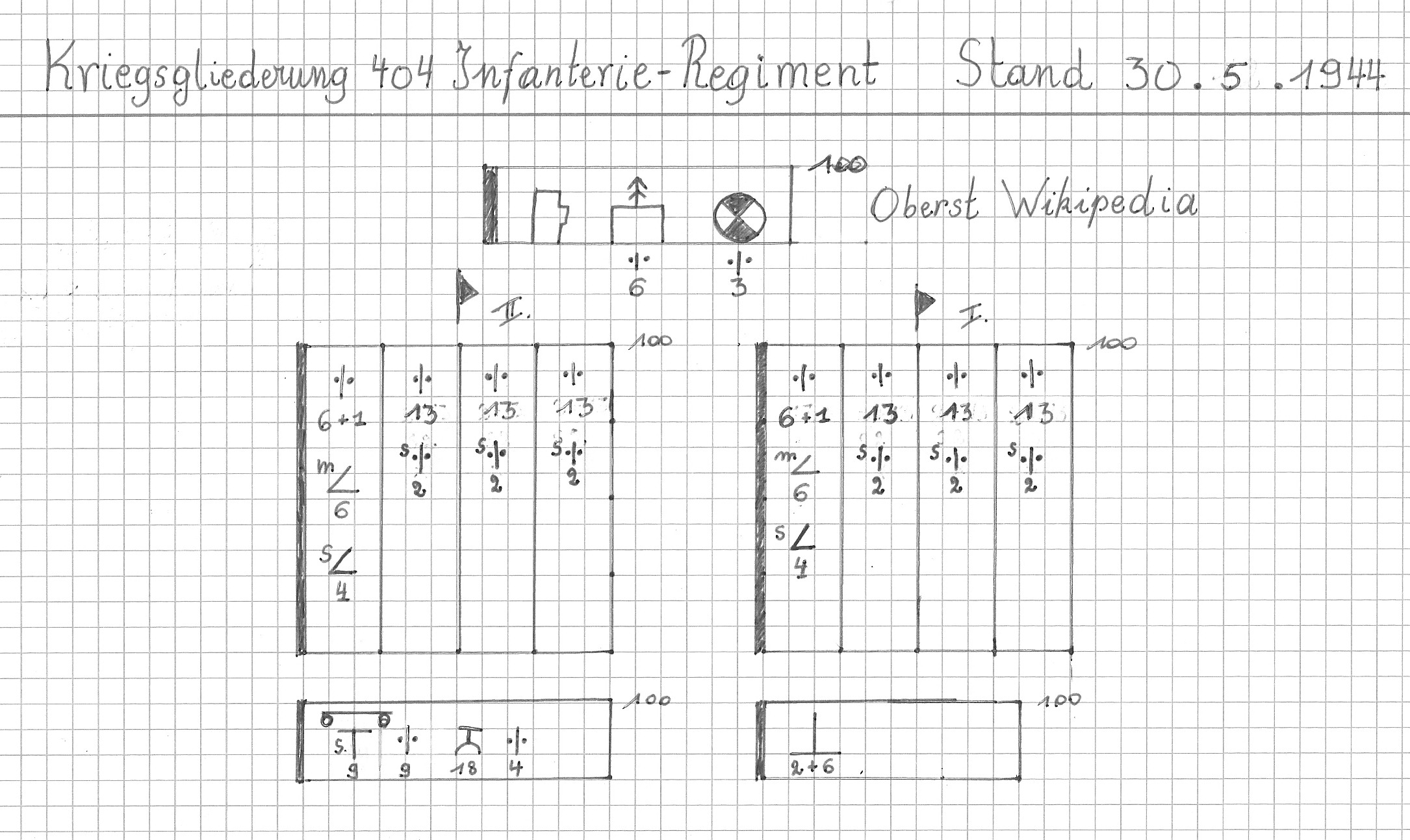 KriegsGliederung Inf rgt 30 mai 1944